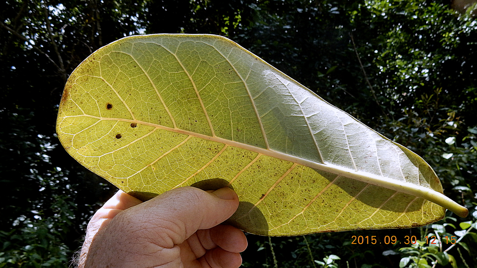 Ficus cyclophylla (Miq.) Miq.